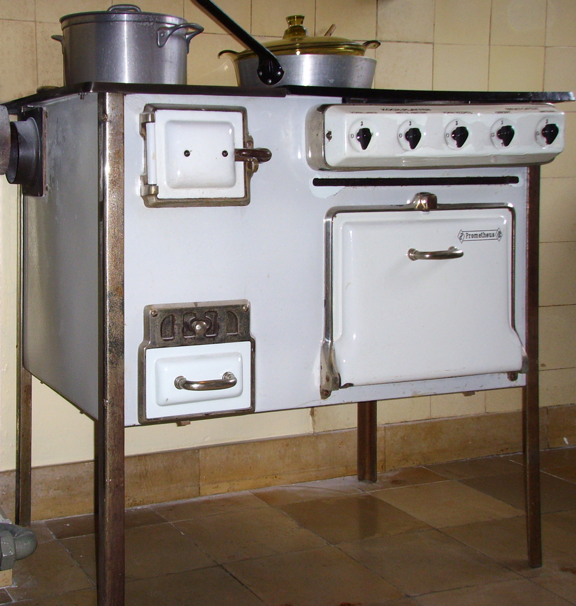 "Kochmaschine" (kitchen stove) in einer Frankfurter Küche. Ernst-May-Haus, Im Burgfeld 136, Frankfurt am Main-Römerstadt